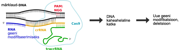 crRNA-tracrRNA-Cas9 seostumine märklaud-DNAga